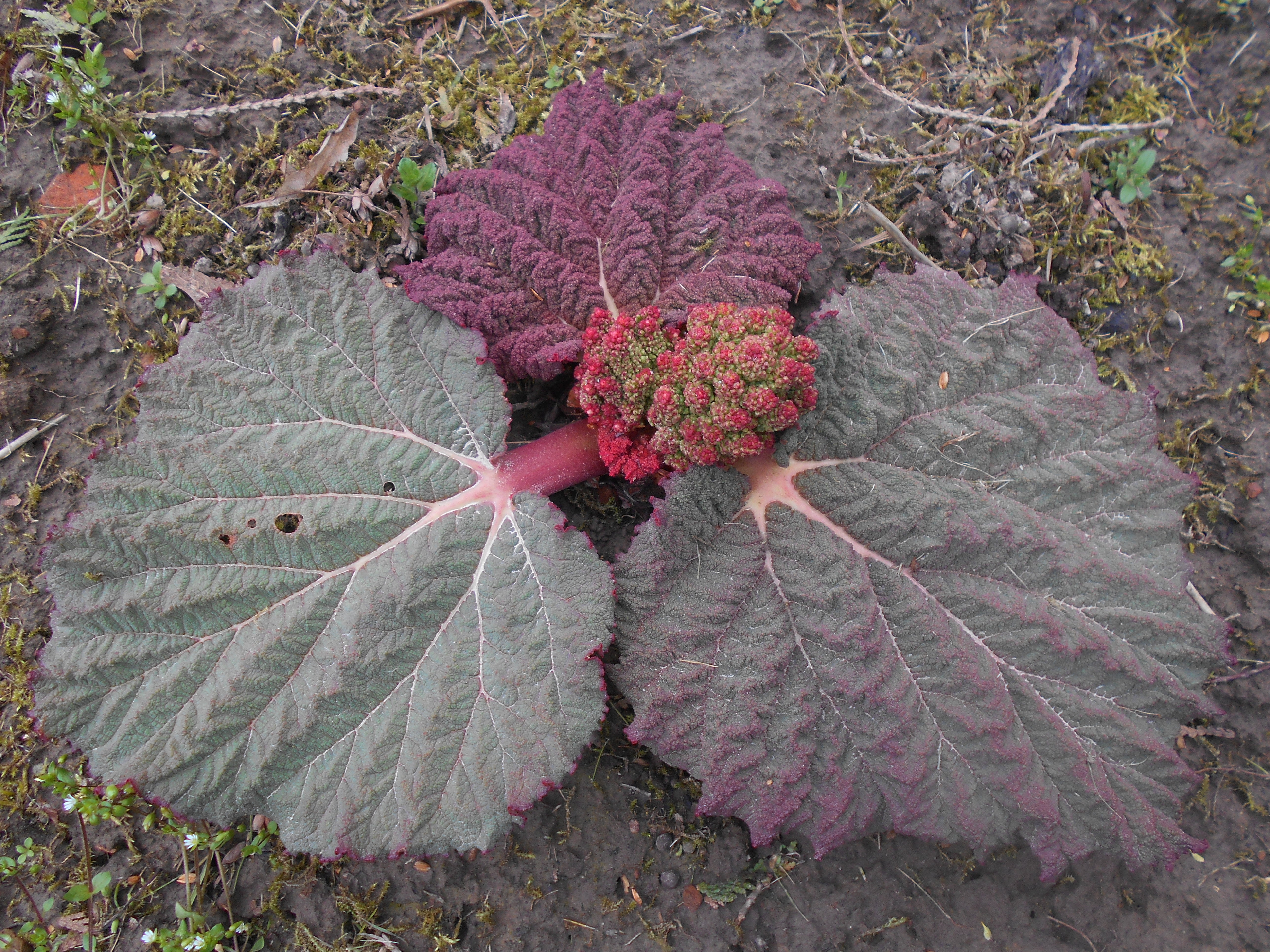 Rabarbar tybetański (Rheum tibeticum), Ogród Botaniczny UMCS w Lublinie